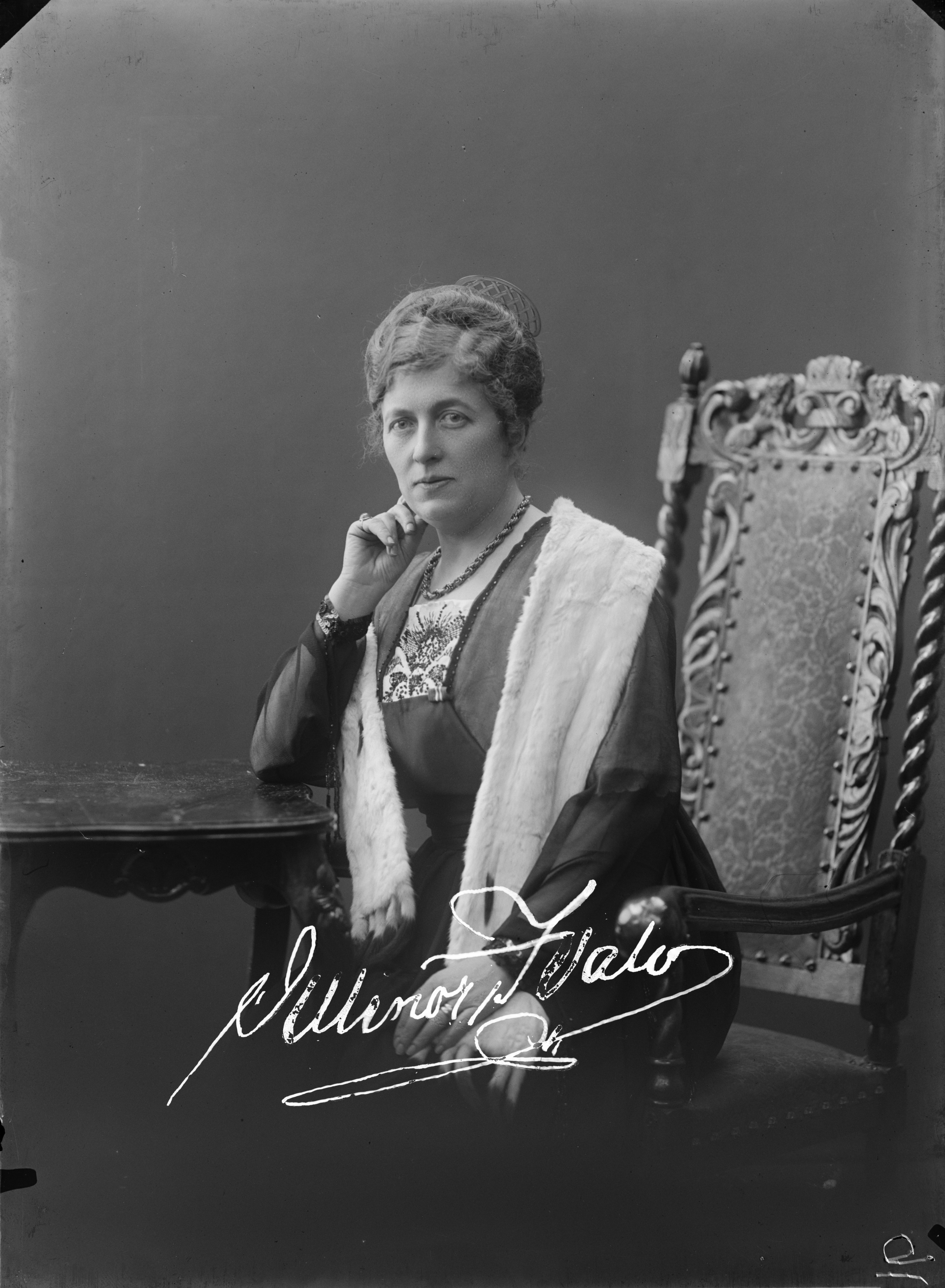 Ellinor Ivalo